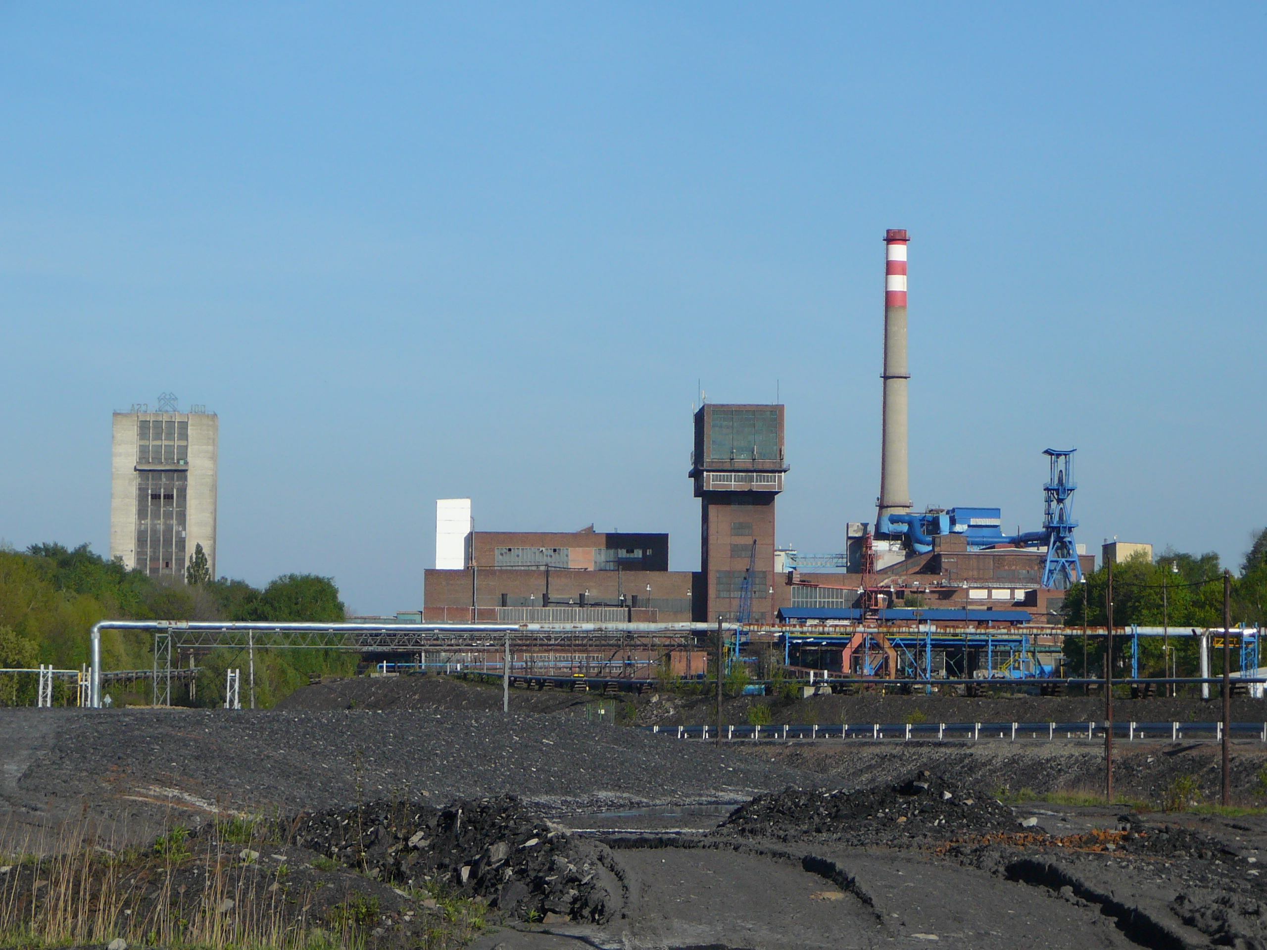 Pohled na důl ČSA